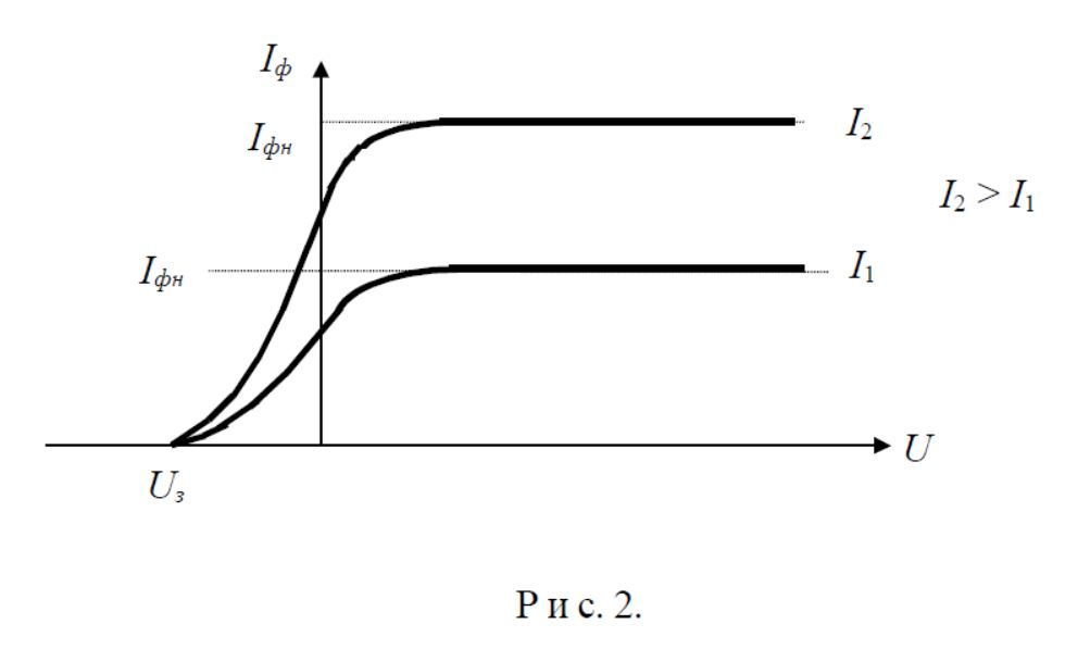 Зависимость фототока от напряжения